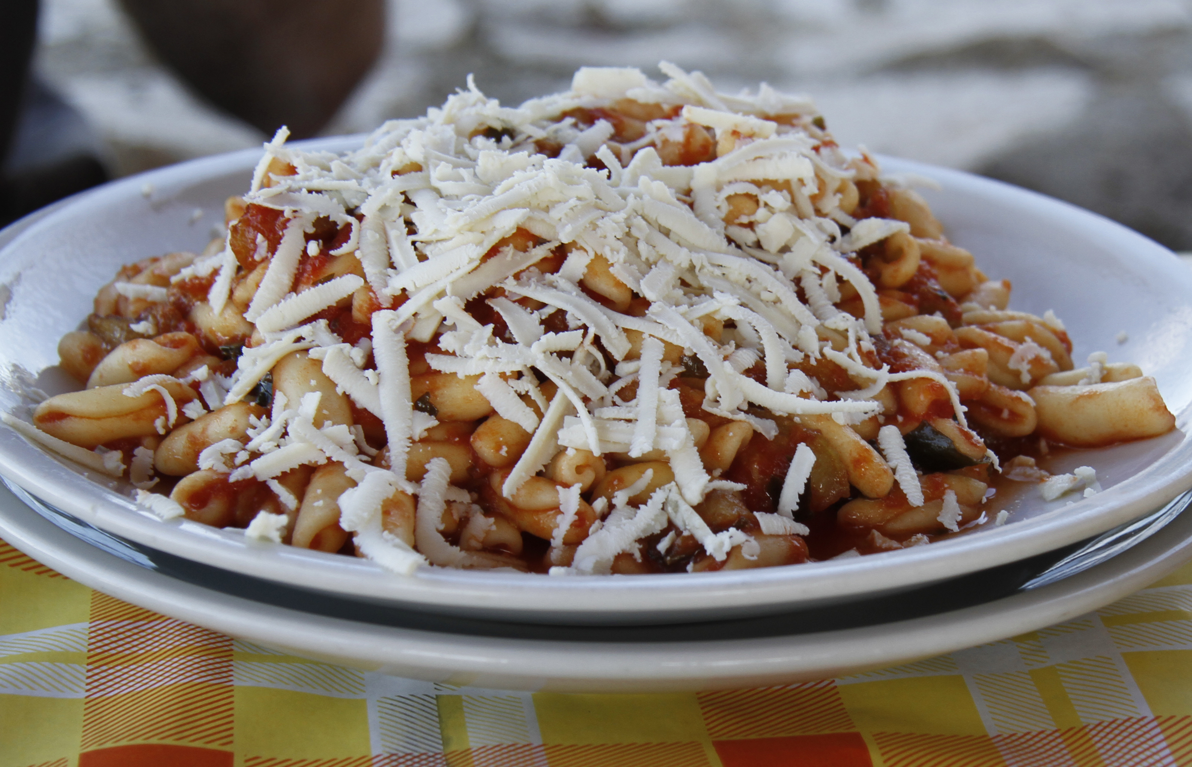 Noto, Cavatelli pomodoro ricotta salata